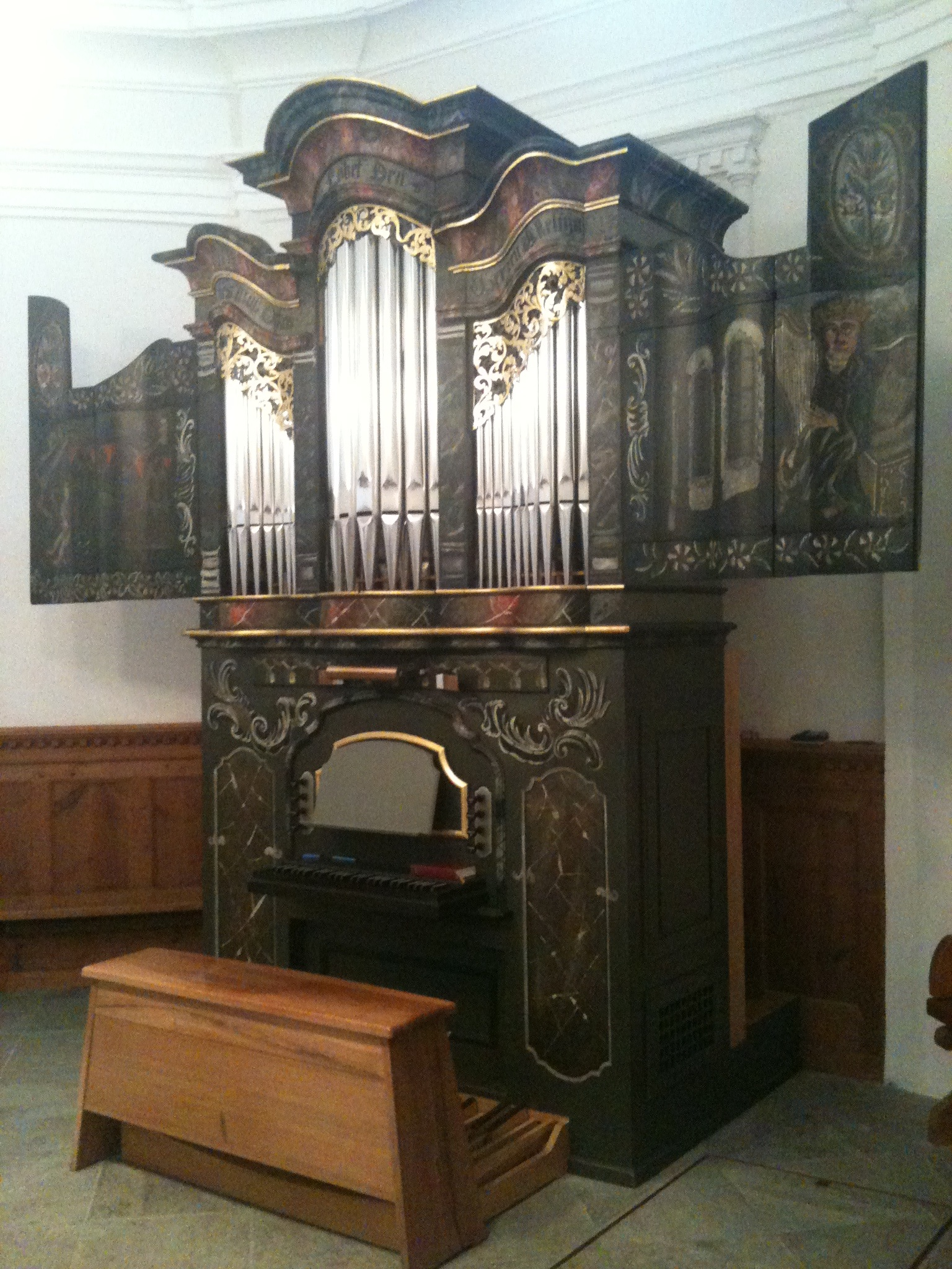 Orgel in der reformierten Kirche in Sils im Domleschg (Kanton Graubünden, Schweiz)